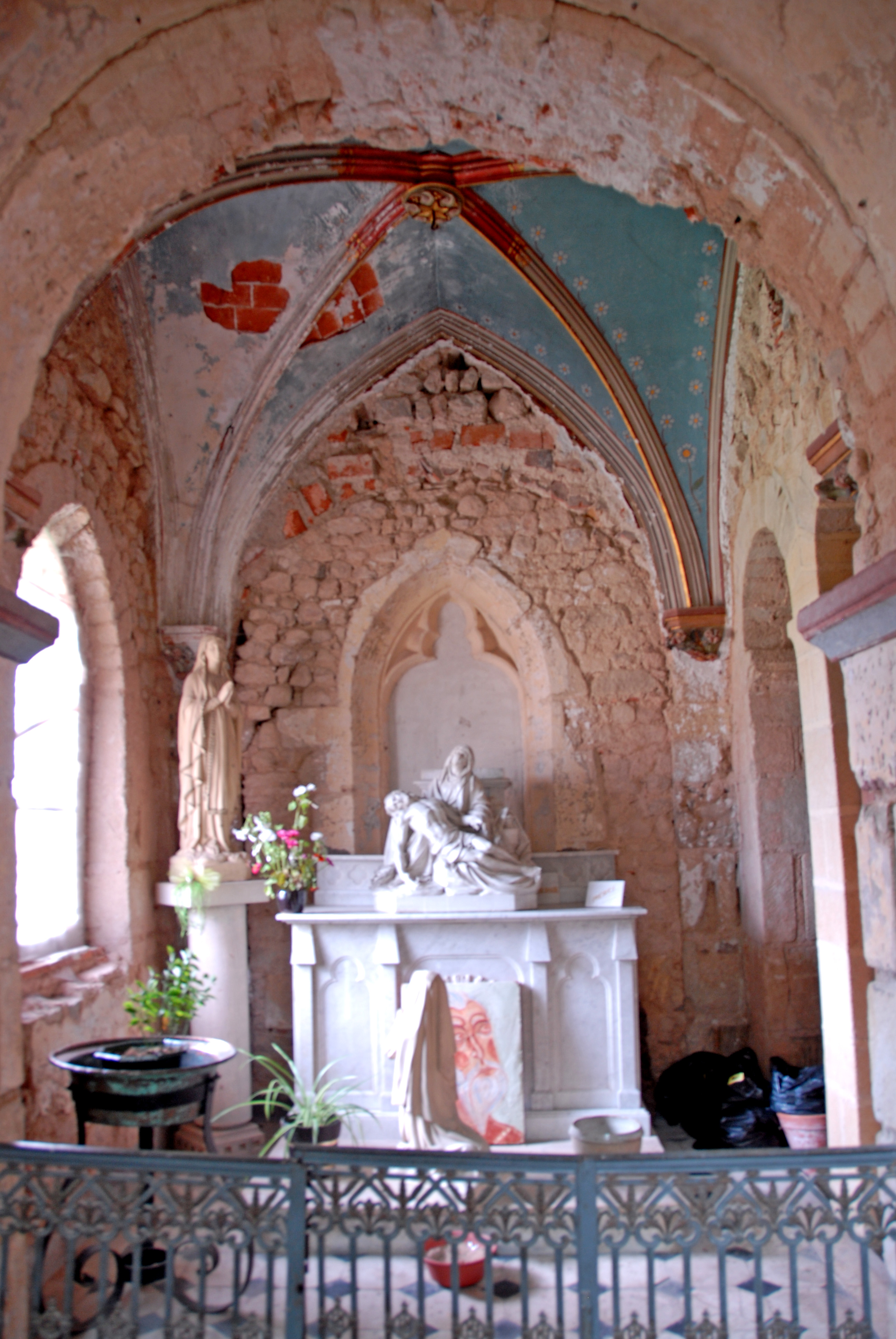 Prioratskirche, nordwestl. Chorseitenschiff